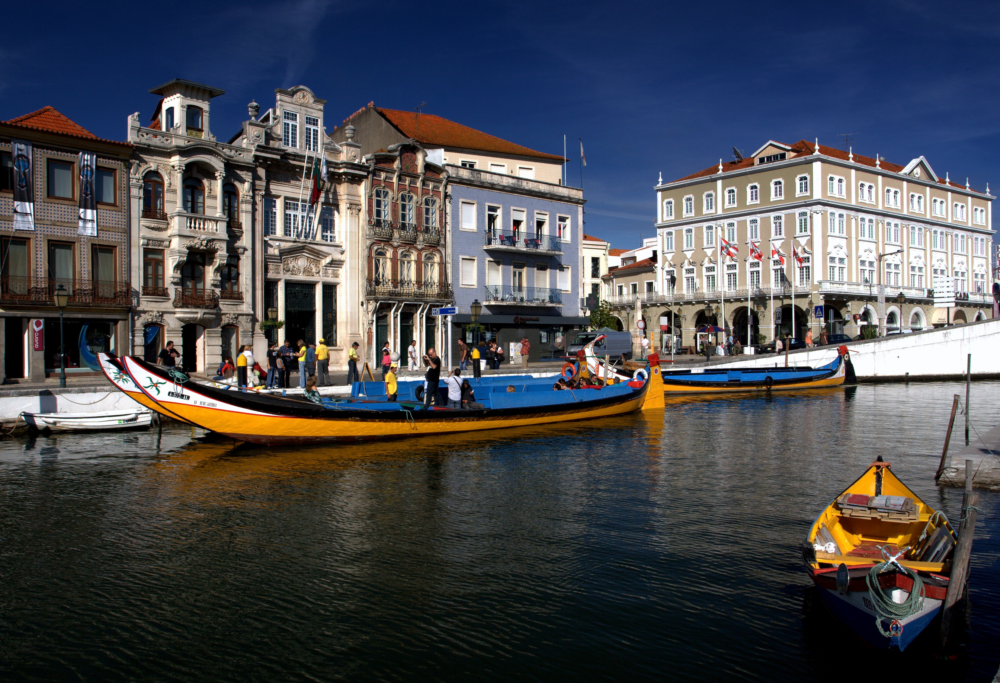 Junto da Capitania de Aveiro